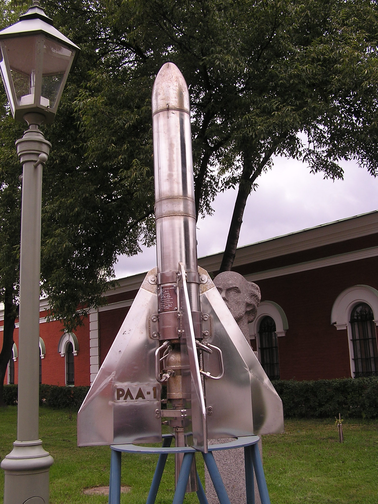 Музей космонавтики и ракетной техники (в Иоанновском равелине Петропавловской крепости). РЛА-1 This photograph was taken in Museum of Space and Missile Technology (Saint Petersburg) Object location59° 57′ 07″ N, 30° 19′ 16″ E